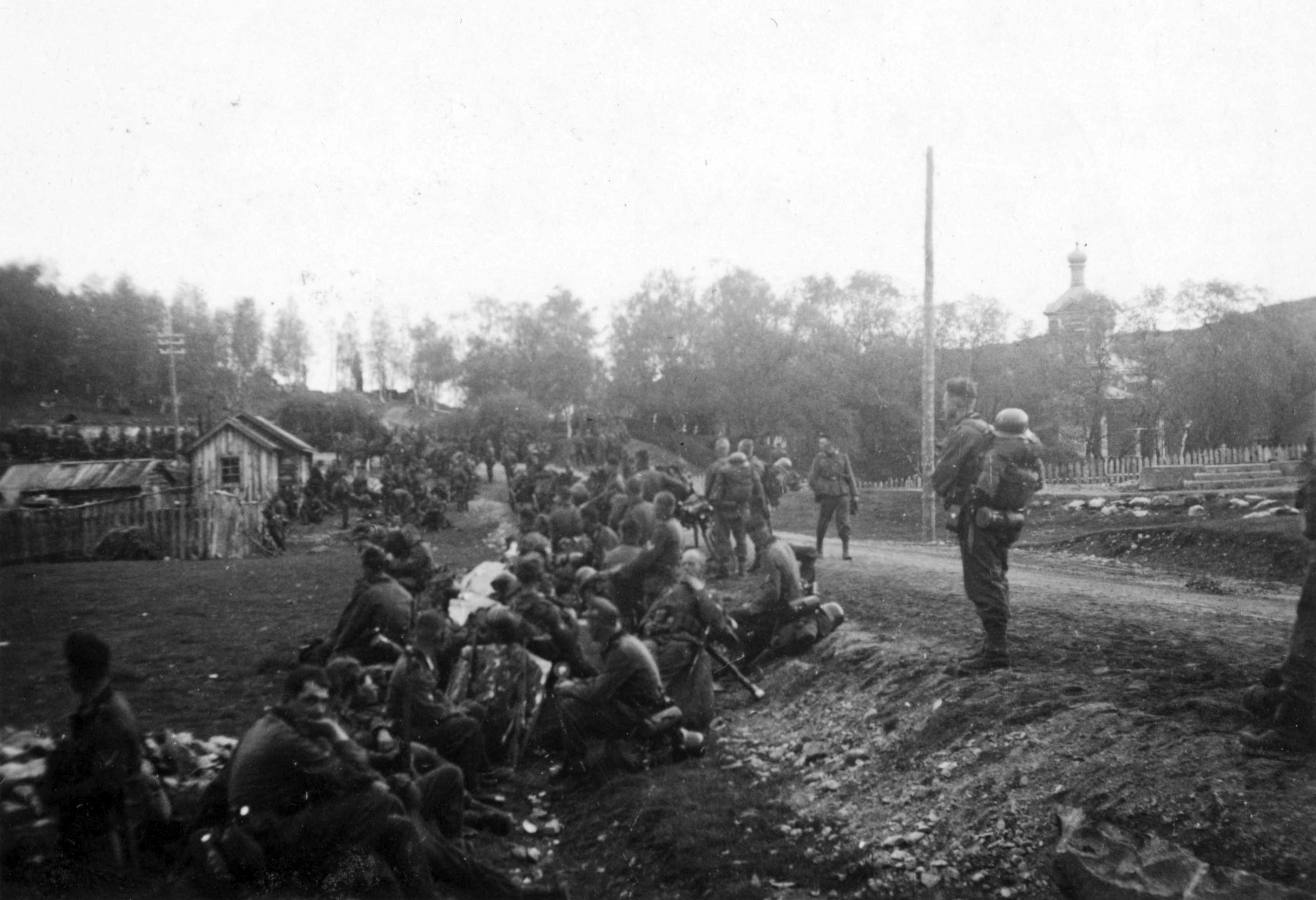 Avreise til Russland, bergjegerene hviler i Boris Gleb før reisen videre Tittel / Title: Avreise til Russland Dato / Date: 22. juni 1940 Fotograf / Photographer: Ukjent/Unknown Utgiver / Publisher: Sted / Place: Boris Gleb Eier / Owner Institution: Arkiv i Nordland Lenke / Link: Arkiv i Nordland Arkivreferanse /Archive reference: AIN.NA143.0260 Fra Dag Skogheims Privatarkiv Tekst bak på bildet: 22. juni 1940: Aufbruch nach Russland über Finnland - Petsamo - richtung Murmansk. Rast vor Boris- Gleb, ganz rechts oberjäger R. Margreiter, davor seine gruppe. 22. juni 1940: Avreise til Russland via Finland- Petsamo - retning Murmansk. Hvile før Boris Gleb, lengst til høyre er overjeger Rudi Margreiter foran sin gruppe. 22 June 1940: Departure to Russia via Finland- Petsamo - direction Murmansk. Rest before Boris Gleb, the rightmost is Senior Gebirgsjäger Rudi Margreiter front of his group.